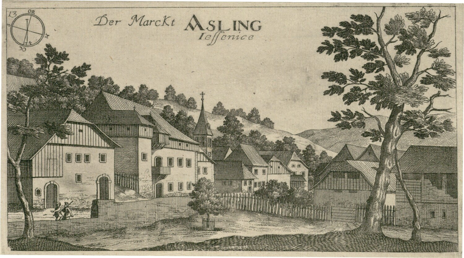 Jesenice